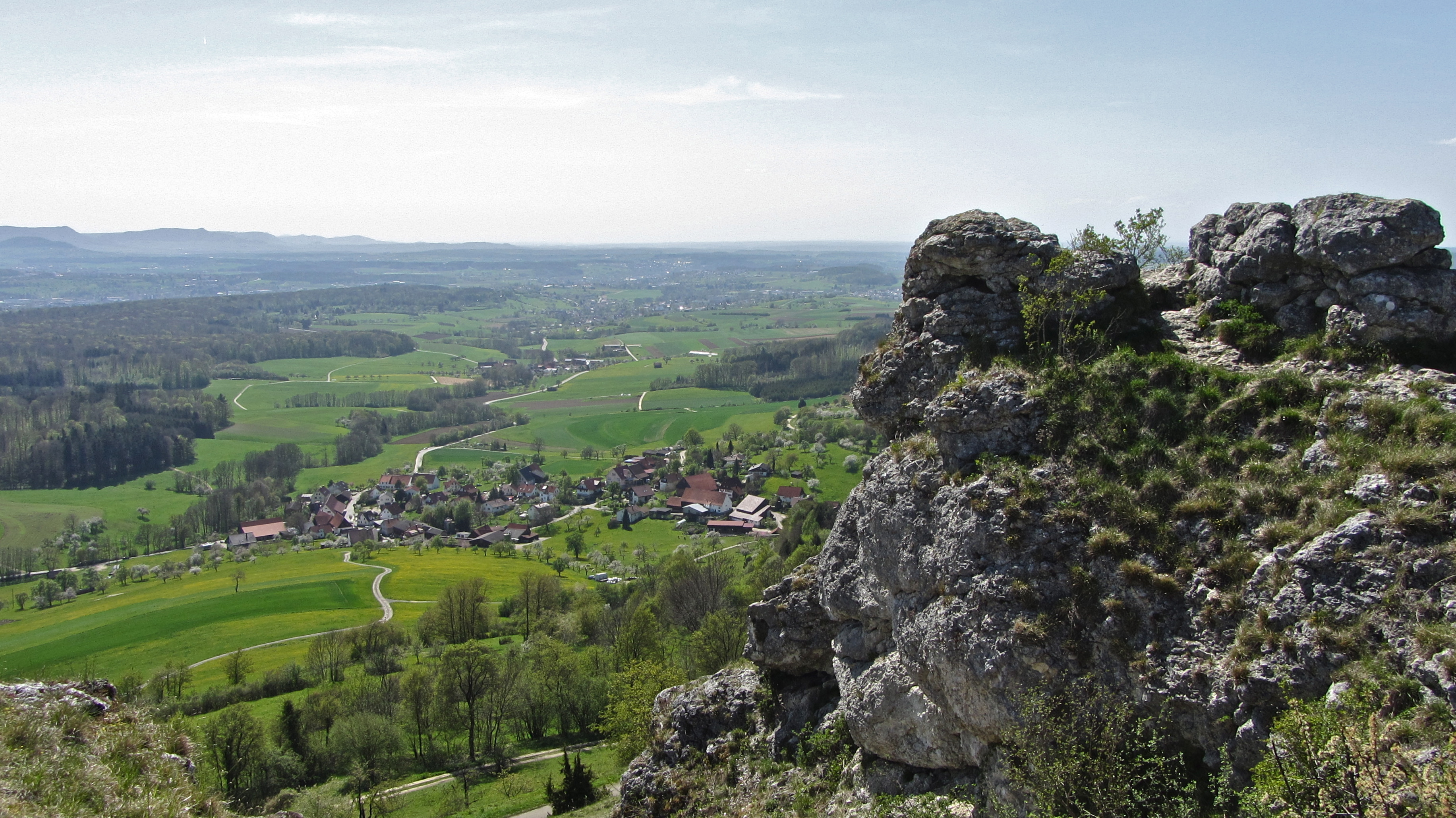 Blick von der Spielburg in Hohenstaufen